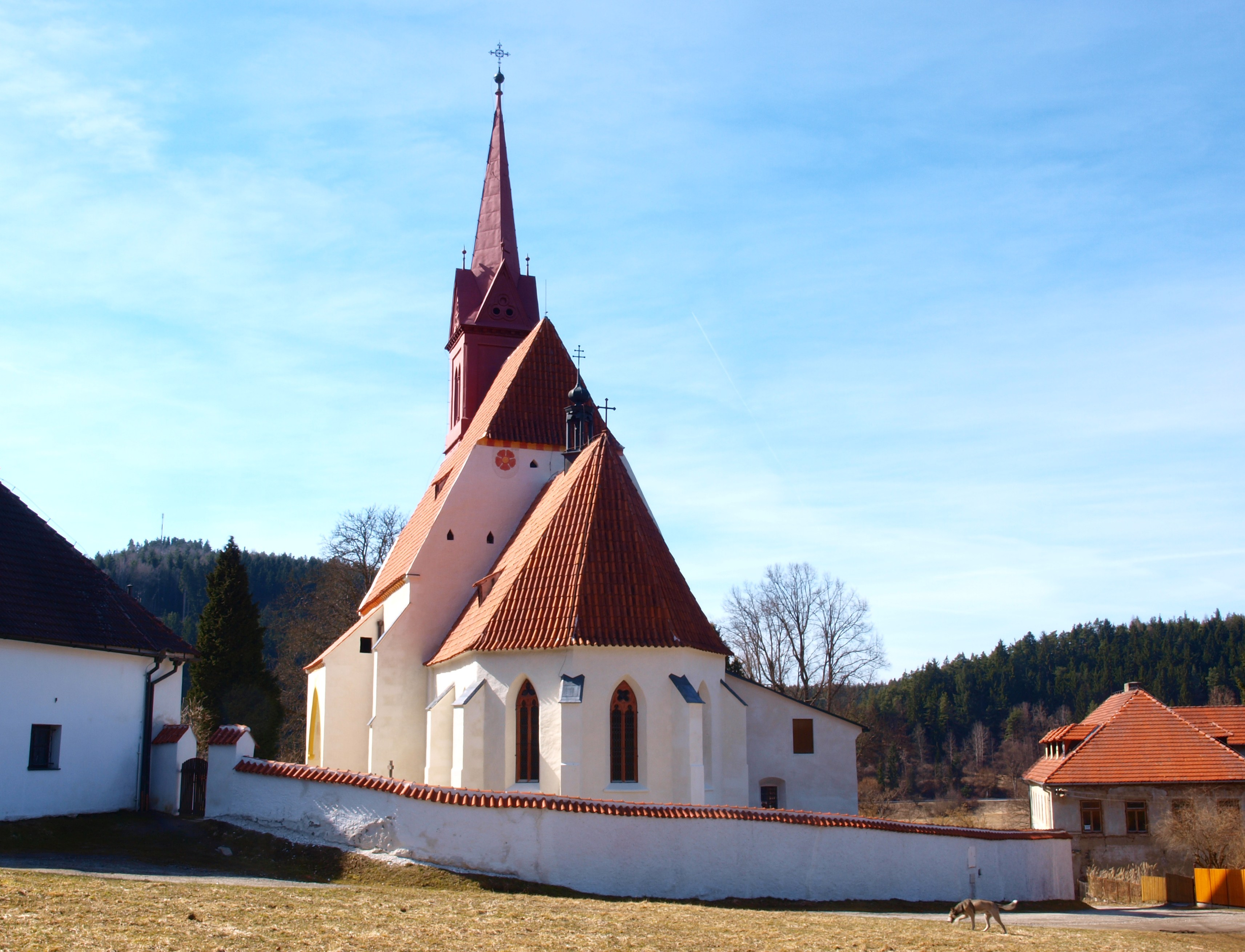 hřbitovní kostelík sv. Jana Nepomuckého